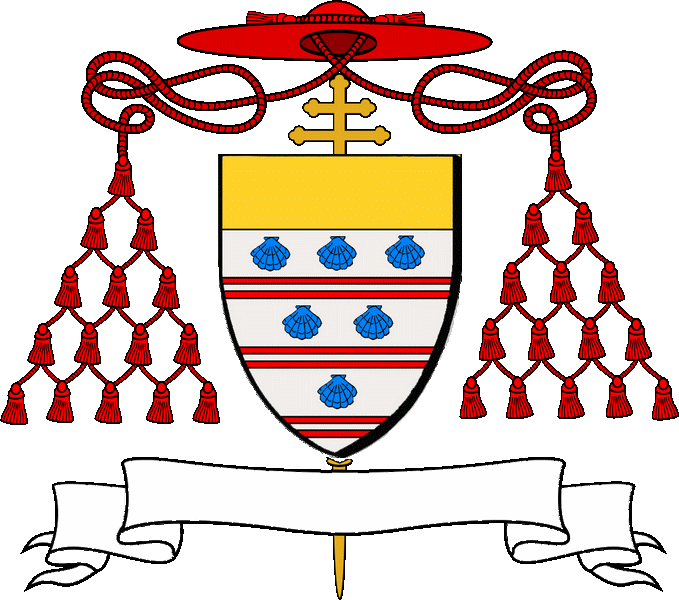 En arc'hant e deir eilenn treustellet en gwad, heuliet gant c'hwec'h kregilhenn en glazur, 3, 2, 1; e gab en aour